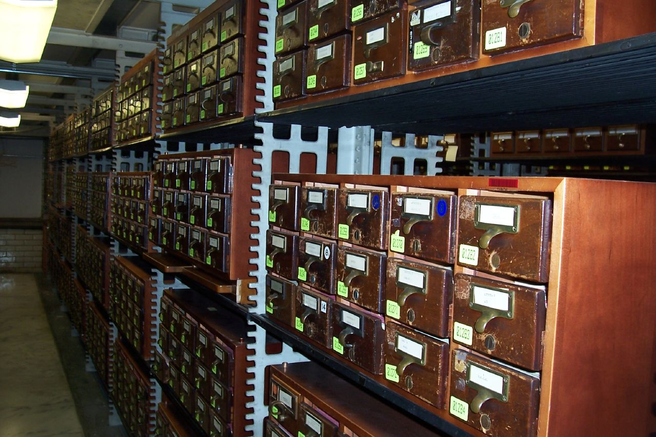 LOC Card Catalog